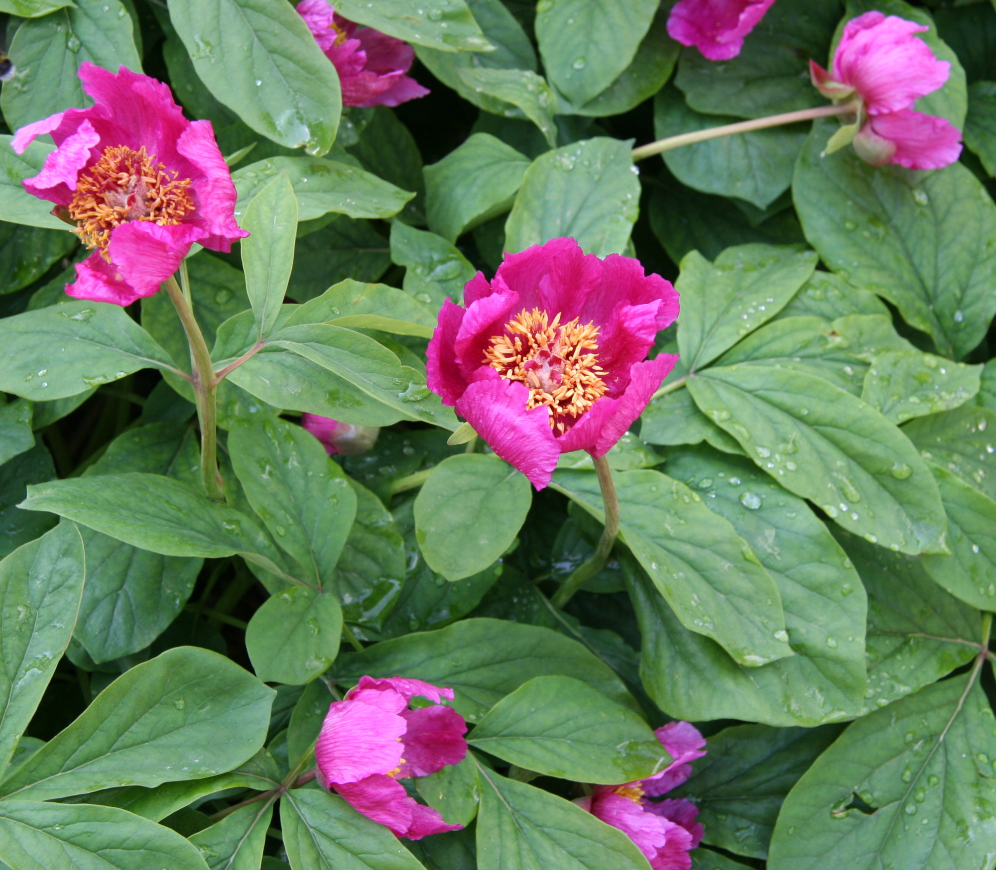 Paeonia mascula im Botanischen Garten Dresden